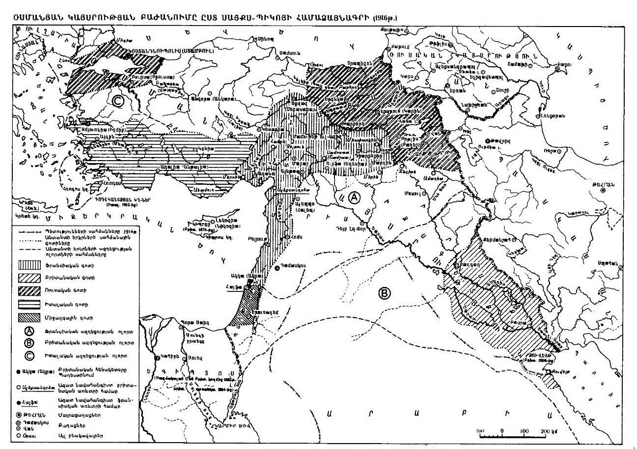 Օսմանյան Կայսրության բաժանումը ըստ Սայքս-Պիկոյի համաձայնագրի (1916)